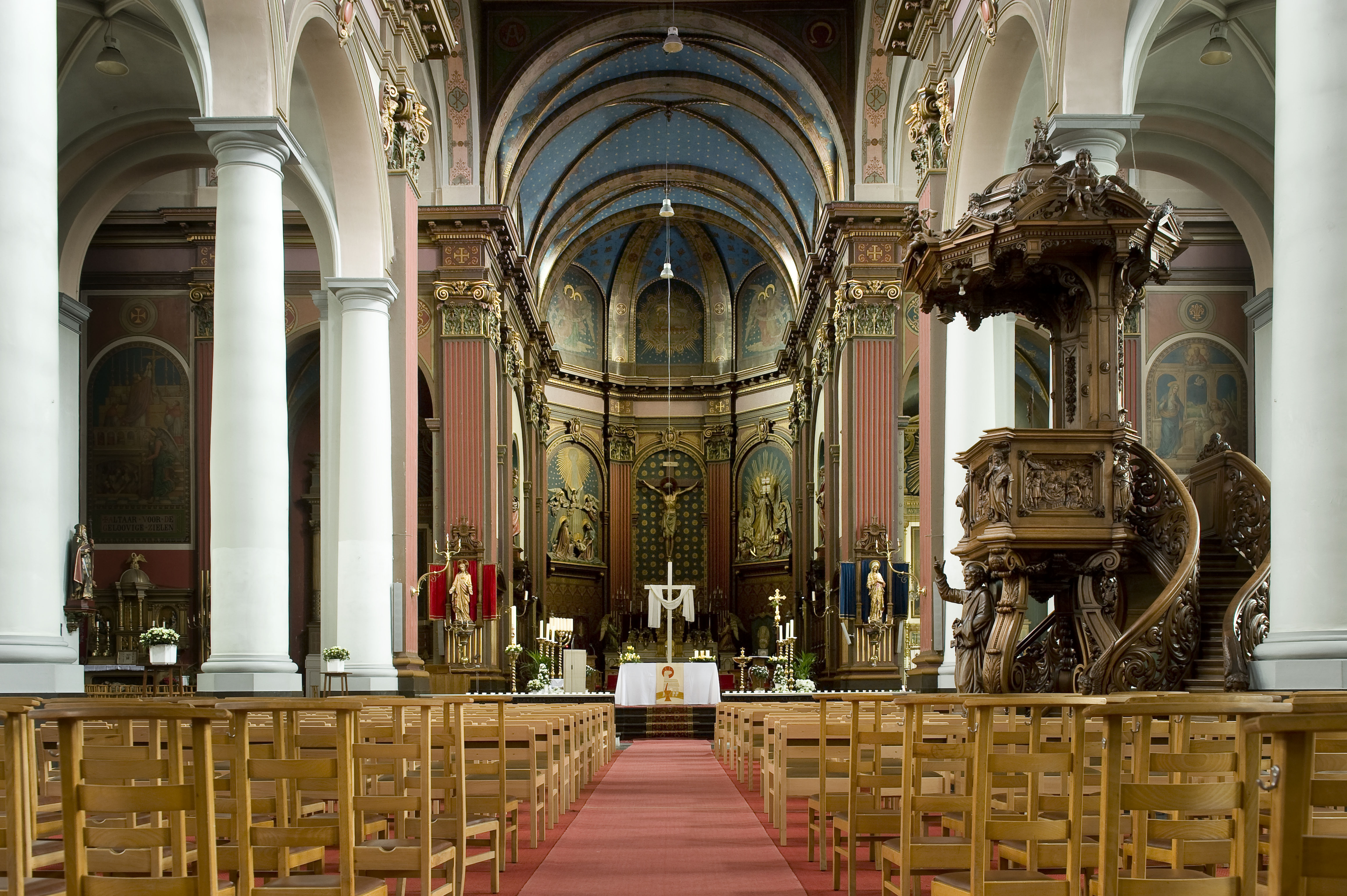 Nazareth (België) - Parochiekerk Onze-Lieve-Vrouw en Sint-Antonius Abt